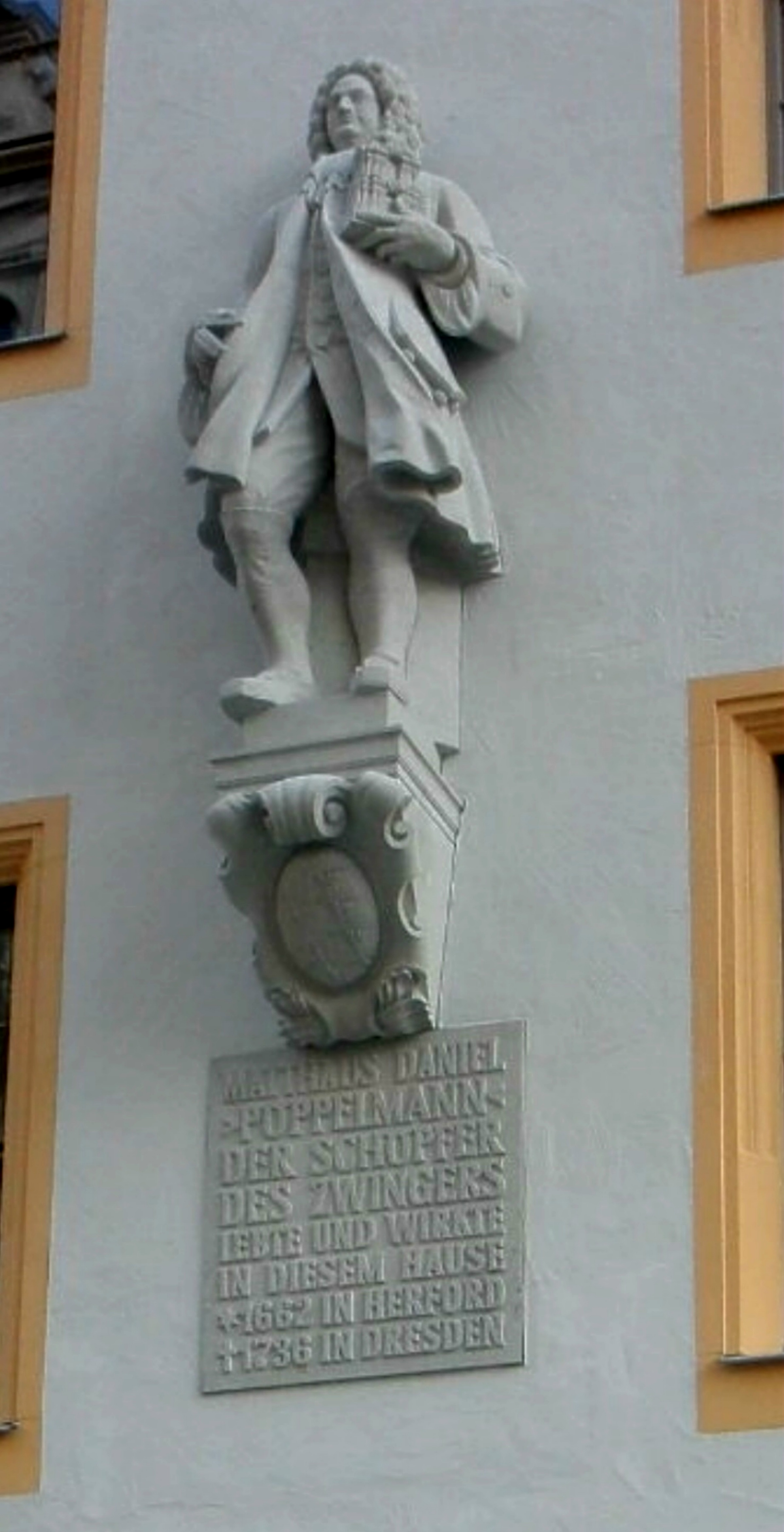 Paul Polte, 1940: Standbild Pöppelmann aus Sandstein, Schlossstraße in Dresden, 1945 zerstört, 2011 wieder an historischer Stelle eingeweiht